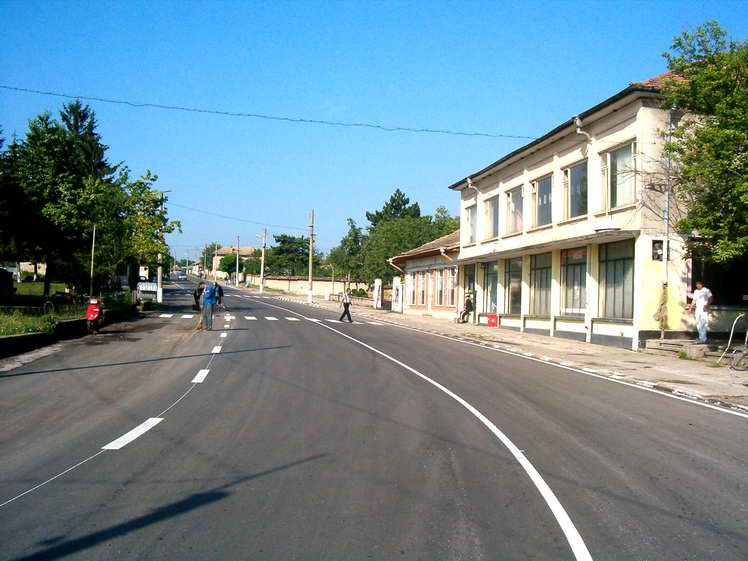 Централната улица в село Ломци, Поповско с шосето за град Разград.